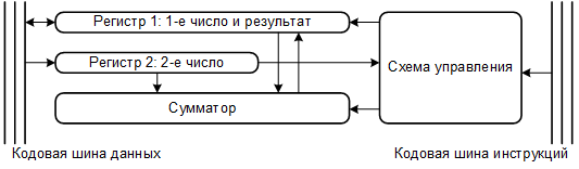 Функциональная схема АЛУ